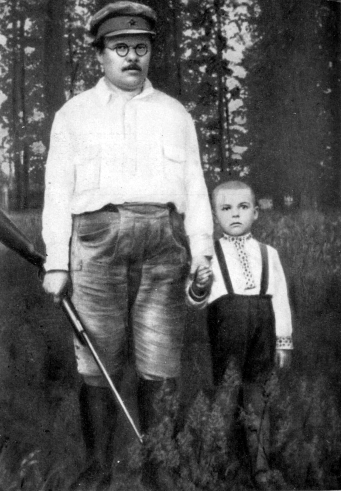 Володимир Петрович із сином